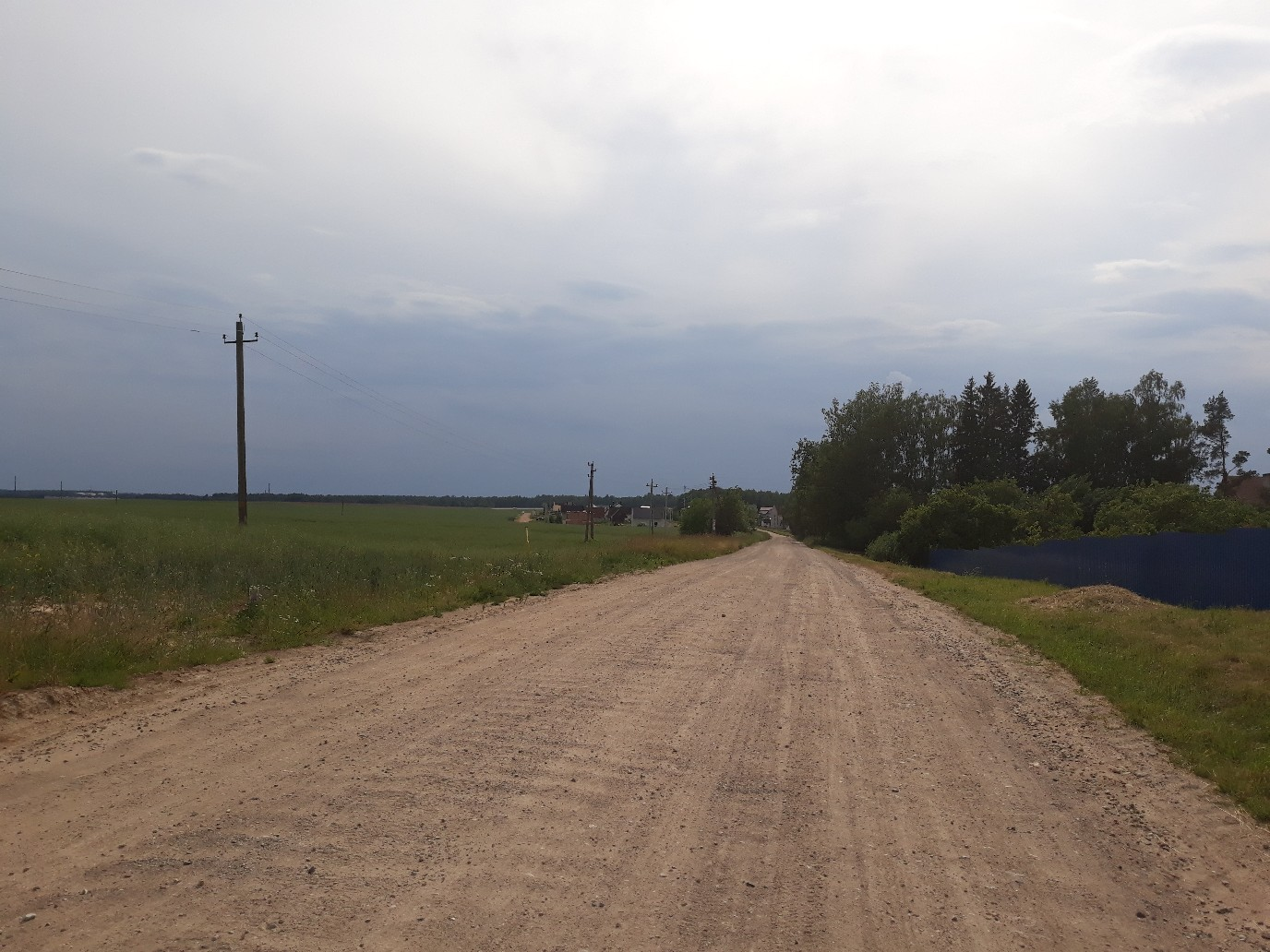 вёска летам 2018